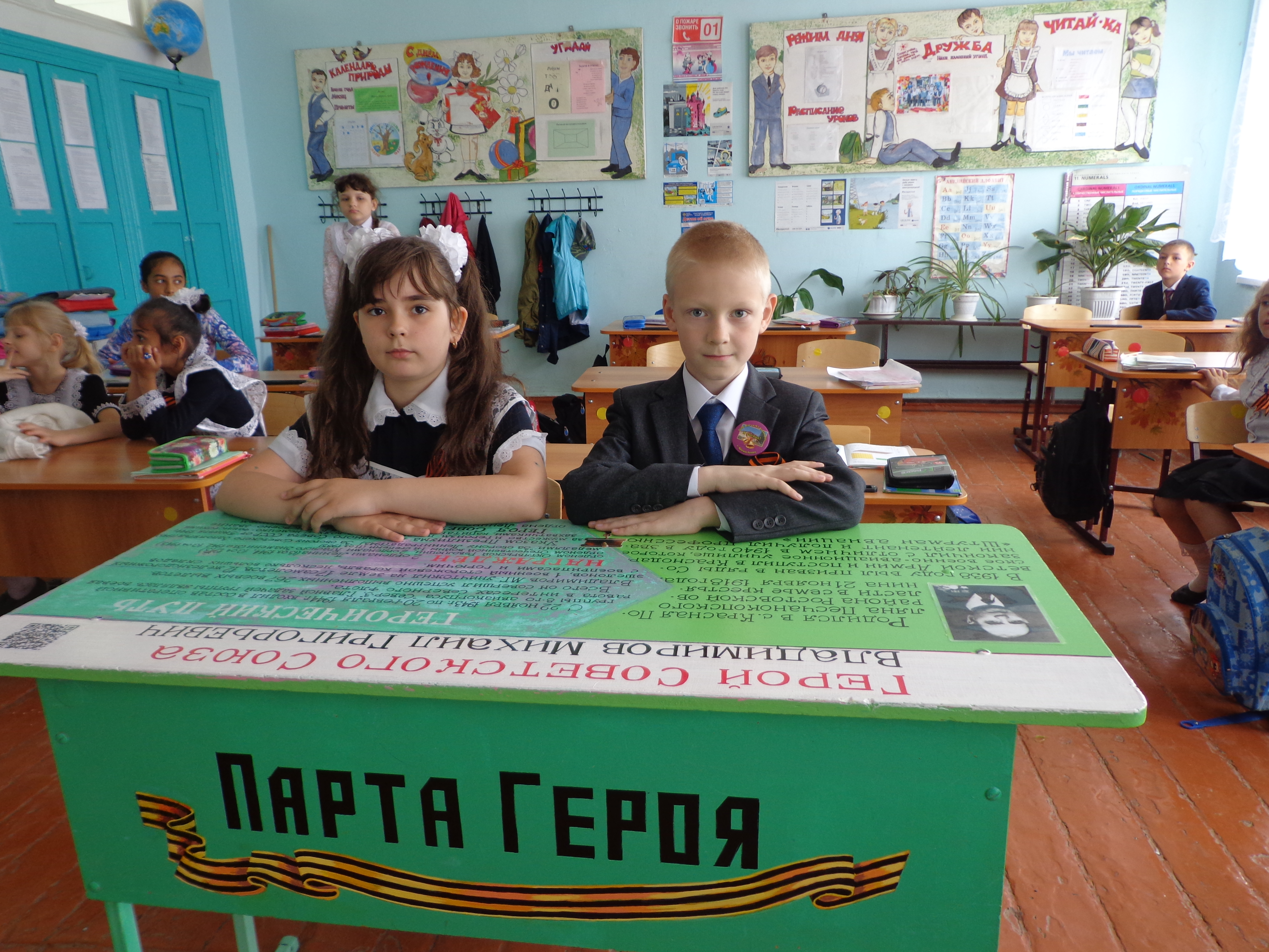 Парта Героя, установленная в школе №32 села Красная Поляна Ростовской области - посвященная Герою СССР Михаилу Григорьевичу Владимирову.